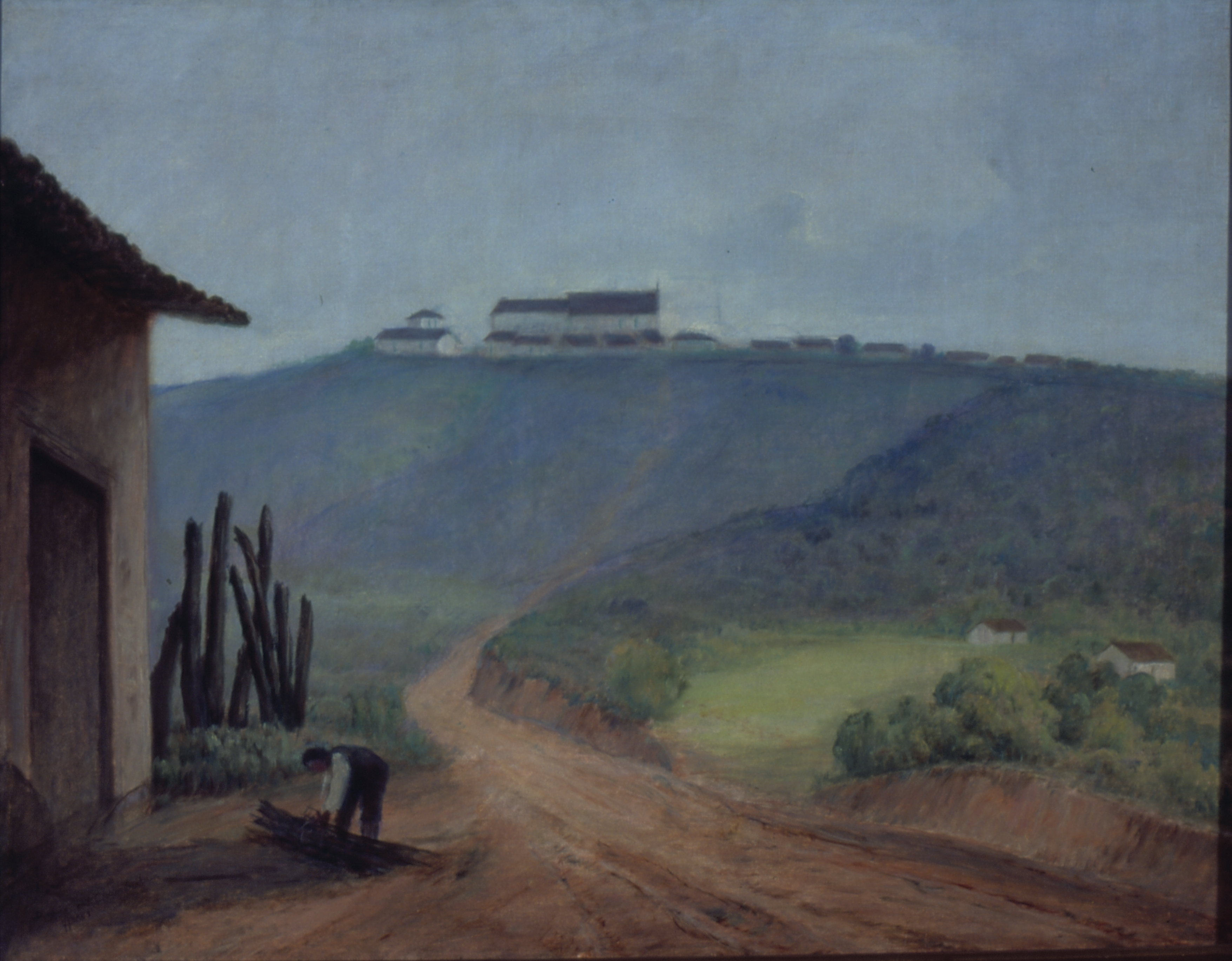 Obra que integra o acervo do Museu Paulista da USP.